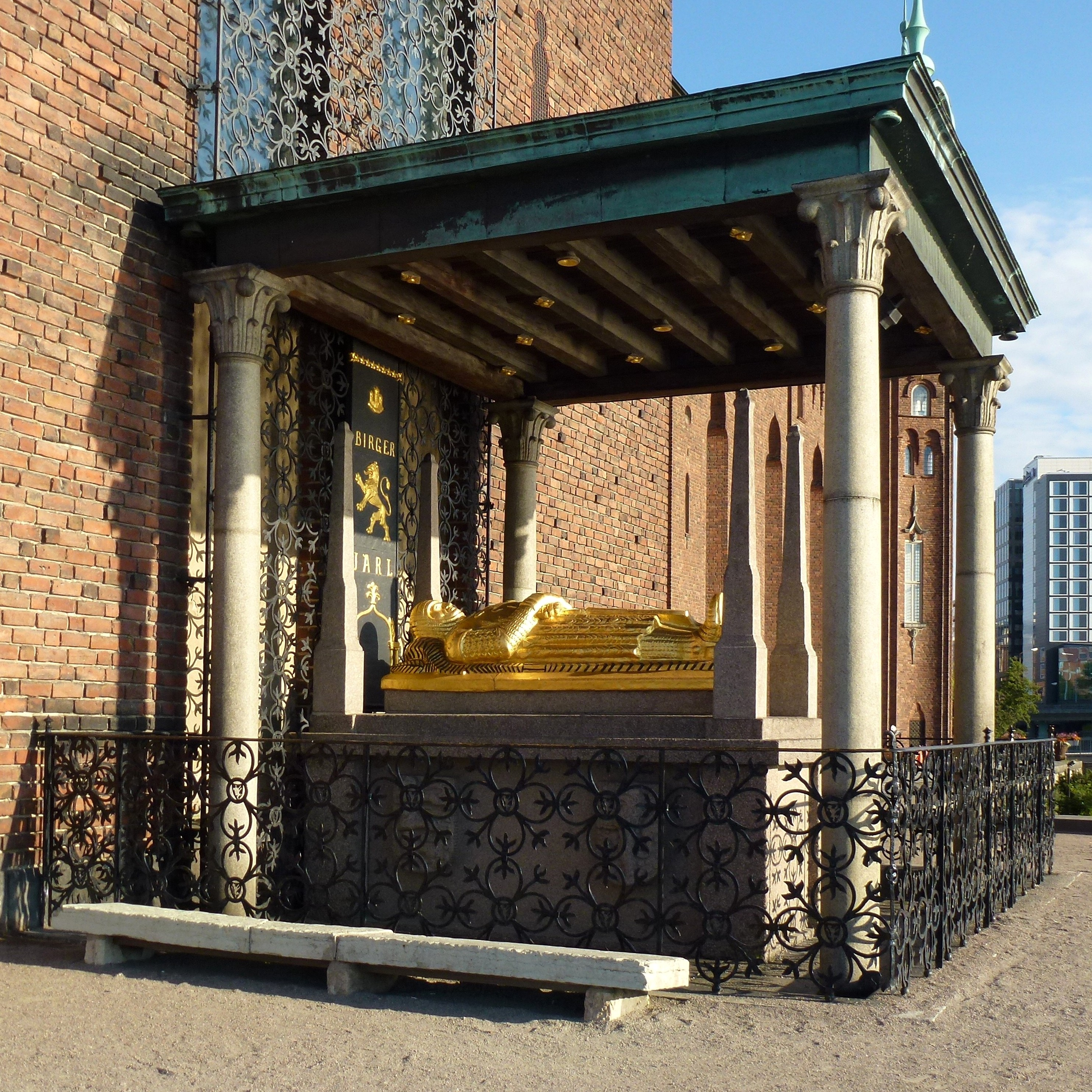 Gustaf Sandbergs kenotaf över Birger jarl